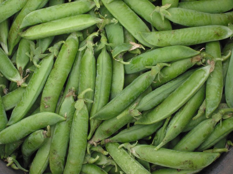 zelfgemaakte foto van peulen van doperwt ras Kelvedon Wonder; half juli